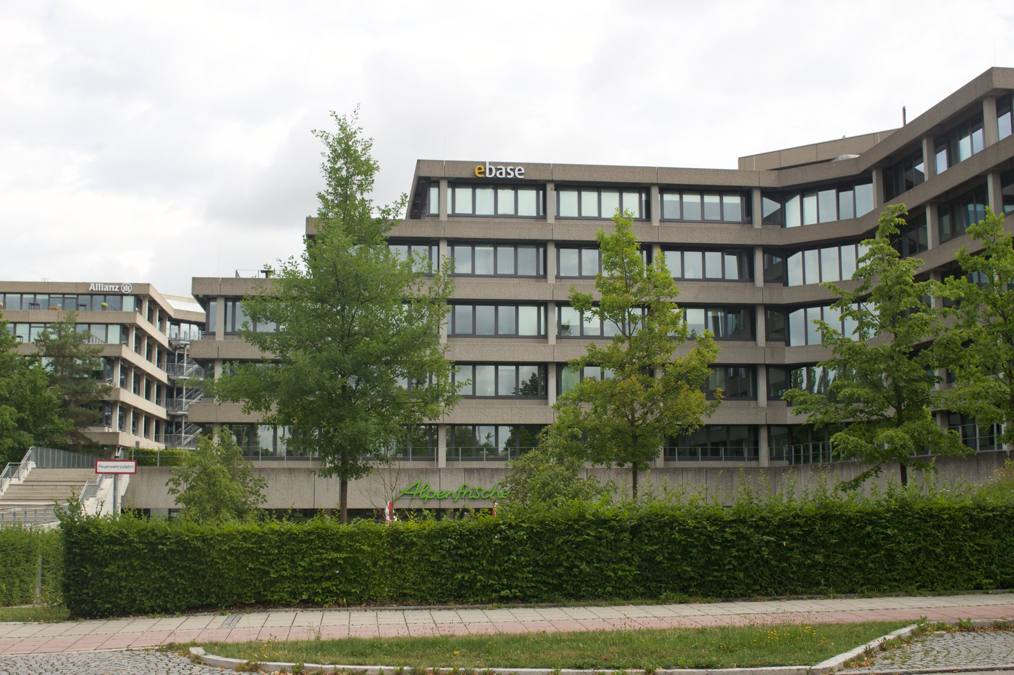 Zentrale der European Bank for Financial Services in Aschheim bei München